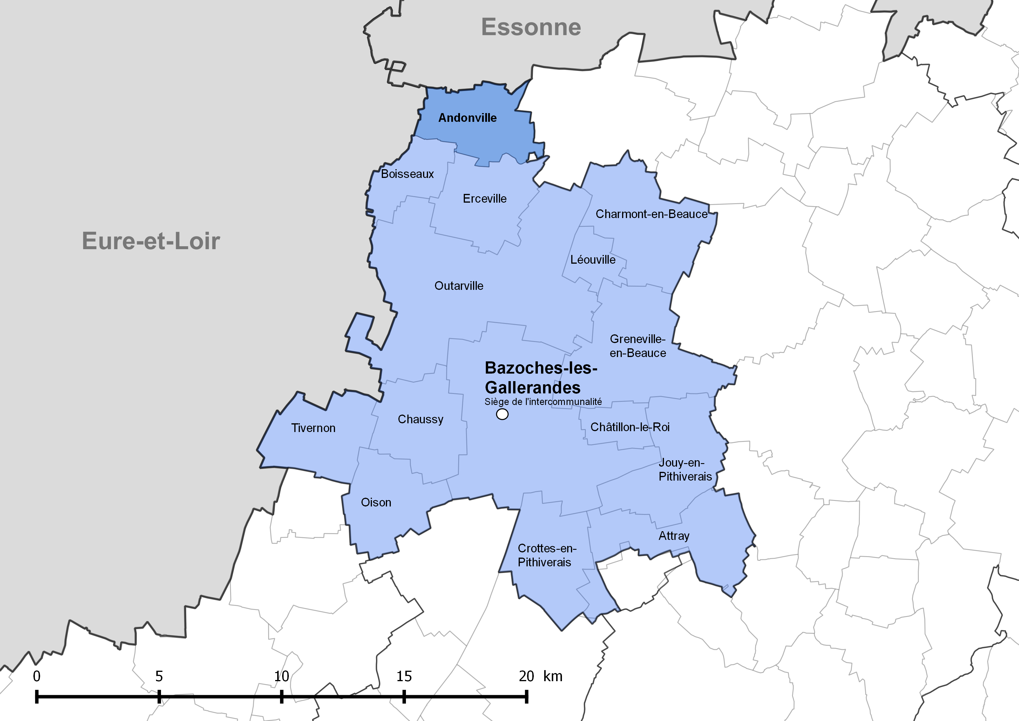 Périmètre de la communauté de communes de la Plaine du Nord Loiret - Situation de la commune d'Andonville.